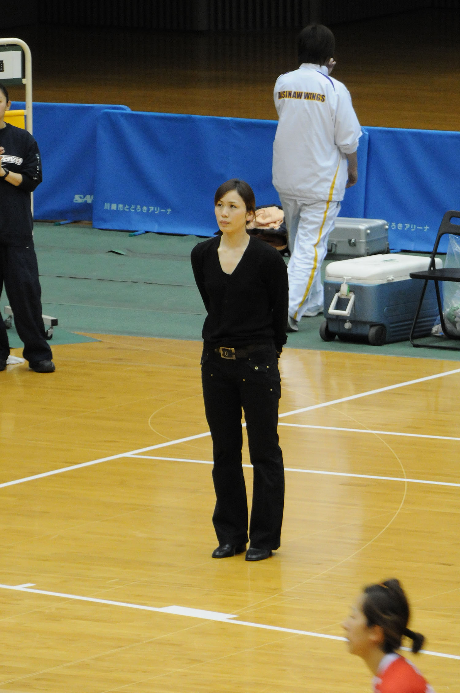 富士通レッドウェーブ、薮内夏美アシスタントコーチ。とどろきアリーナで。